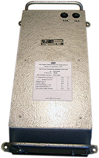 Generator SHP - główny element urządzenia samoczynnego hamowania pociągu (SHP), odpowiedzialny za prawidłową współpracę z rezonatorem torowym oraz wdrożenie nagłego hamowania pociągu przy braku czujności maszynisty.